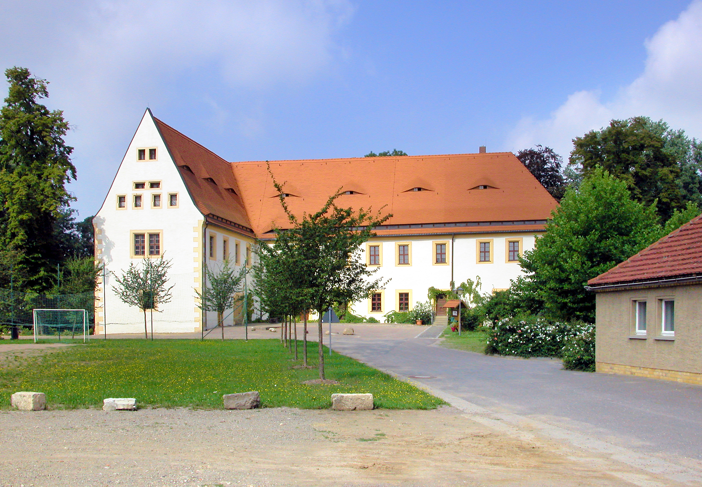 26.08.2007 04758 Hof (Naundorf bei Oschatz): Altes Schloß von Südosten (Renaissance um 1540) [DSCN29094.TIF]20070826210DR.JPG(c)Blobelt